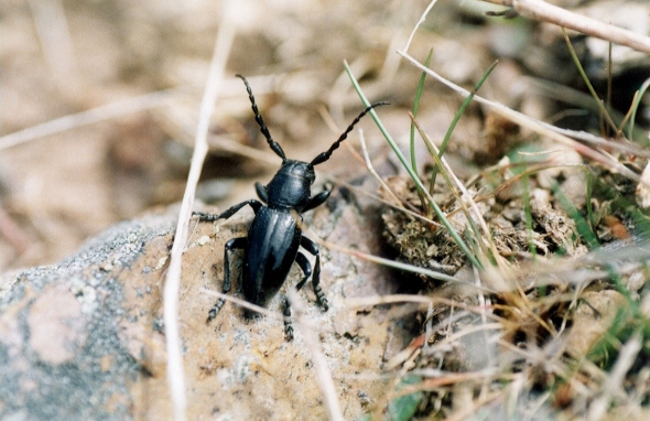 Iberodorcadion amorii